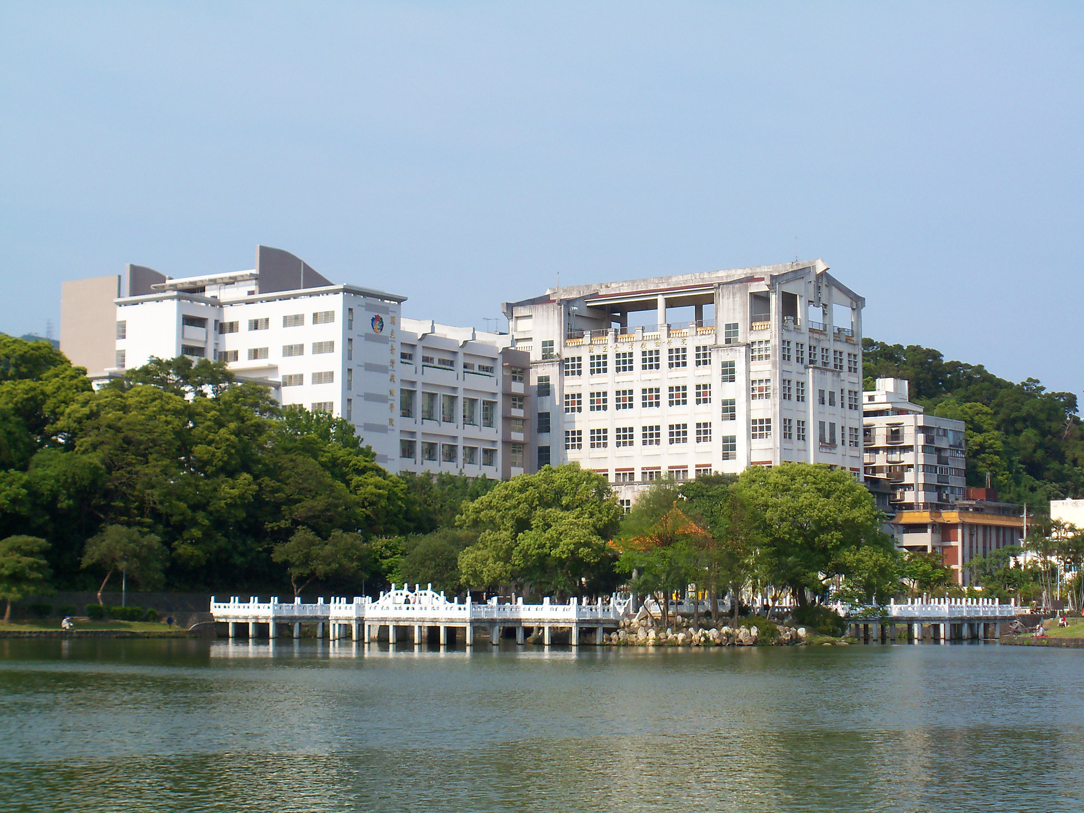 自內湖大埤（碧湖）南岸眺望國立臺灣戲曲學院內湖校區。